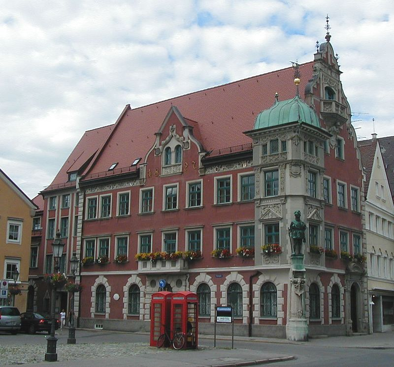 Rathaus von Mindelheim